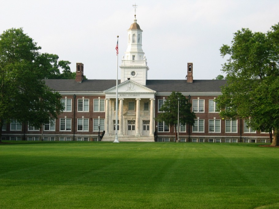 Bunce Hall binasi